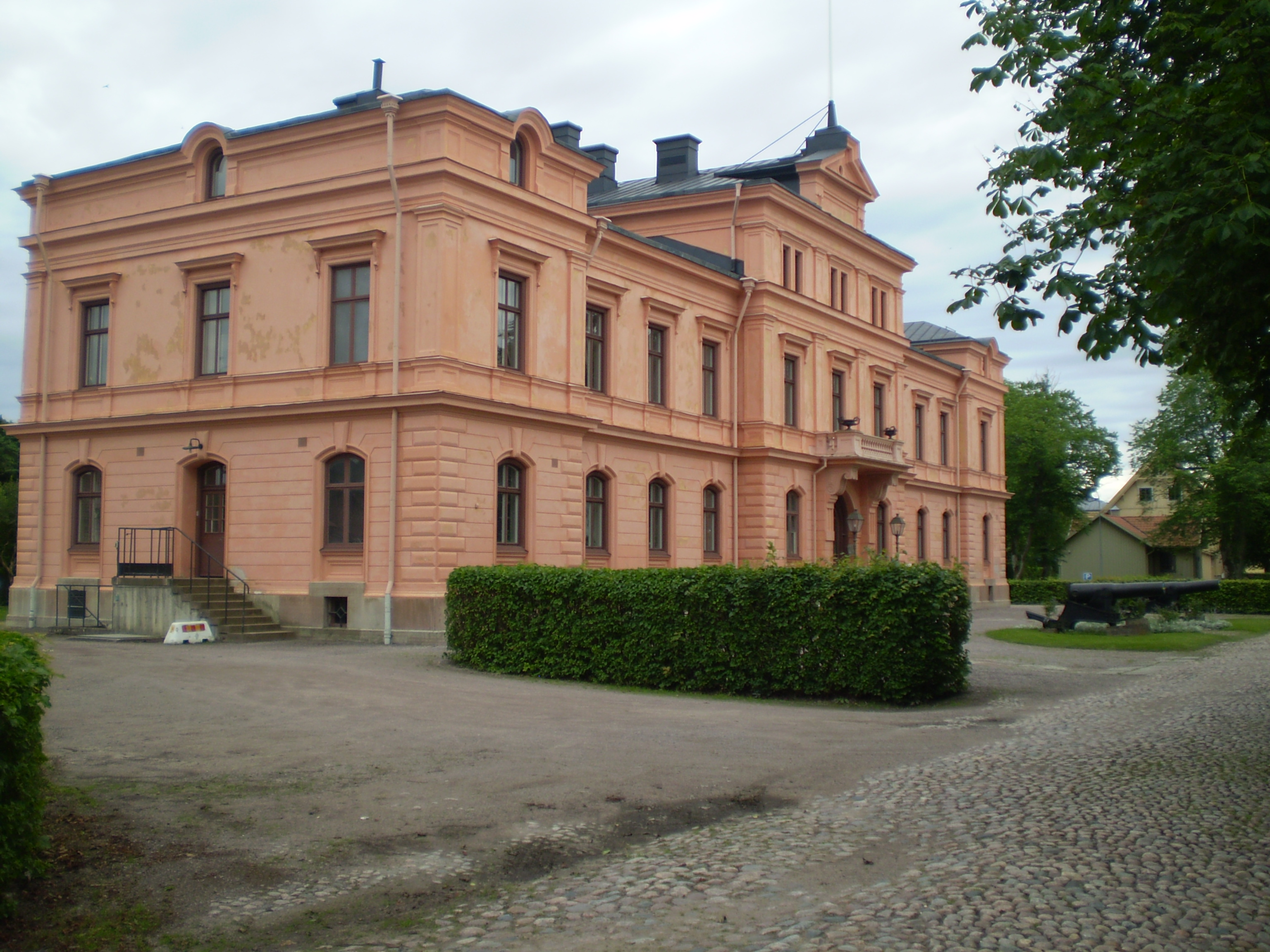 Byggnaden har fungerat som stabshus åt Försvarsstaben i händelse av krig. Och senare som officersmäss för förlagda förband inom Karlsborgs garnison.